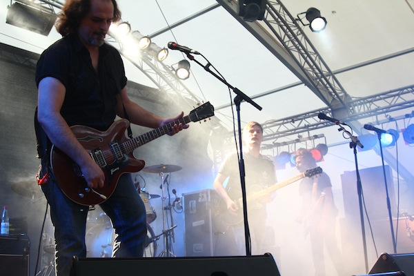 Die deutsche Alternative Band Blackmail in aktueller Besetzung auf dem Omas Teich Festival 2011.